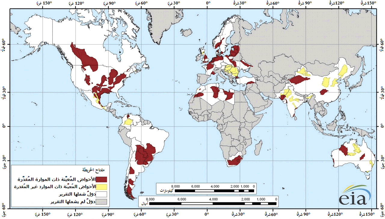 خريطة تُبيِّن الأحواض الرئيسيَّة لِغاز الأُردواز حول العالم.